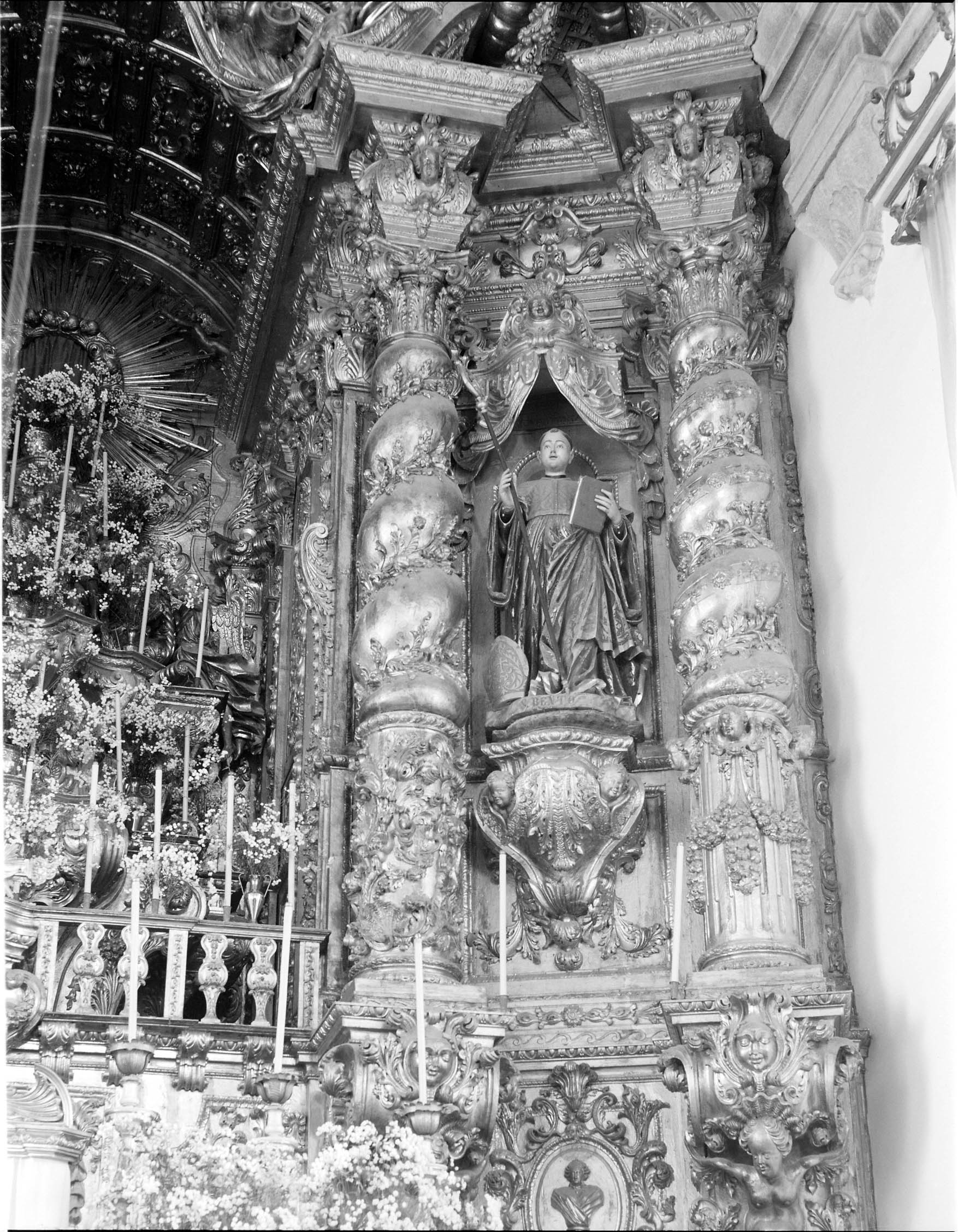 Retábulo principal (ca 1730-1745). Fotógrafo: Robert Chester Smith (1912-1975). Data de produção da fotografia original: 1962-1964. [CFT008.1222n.ic]